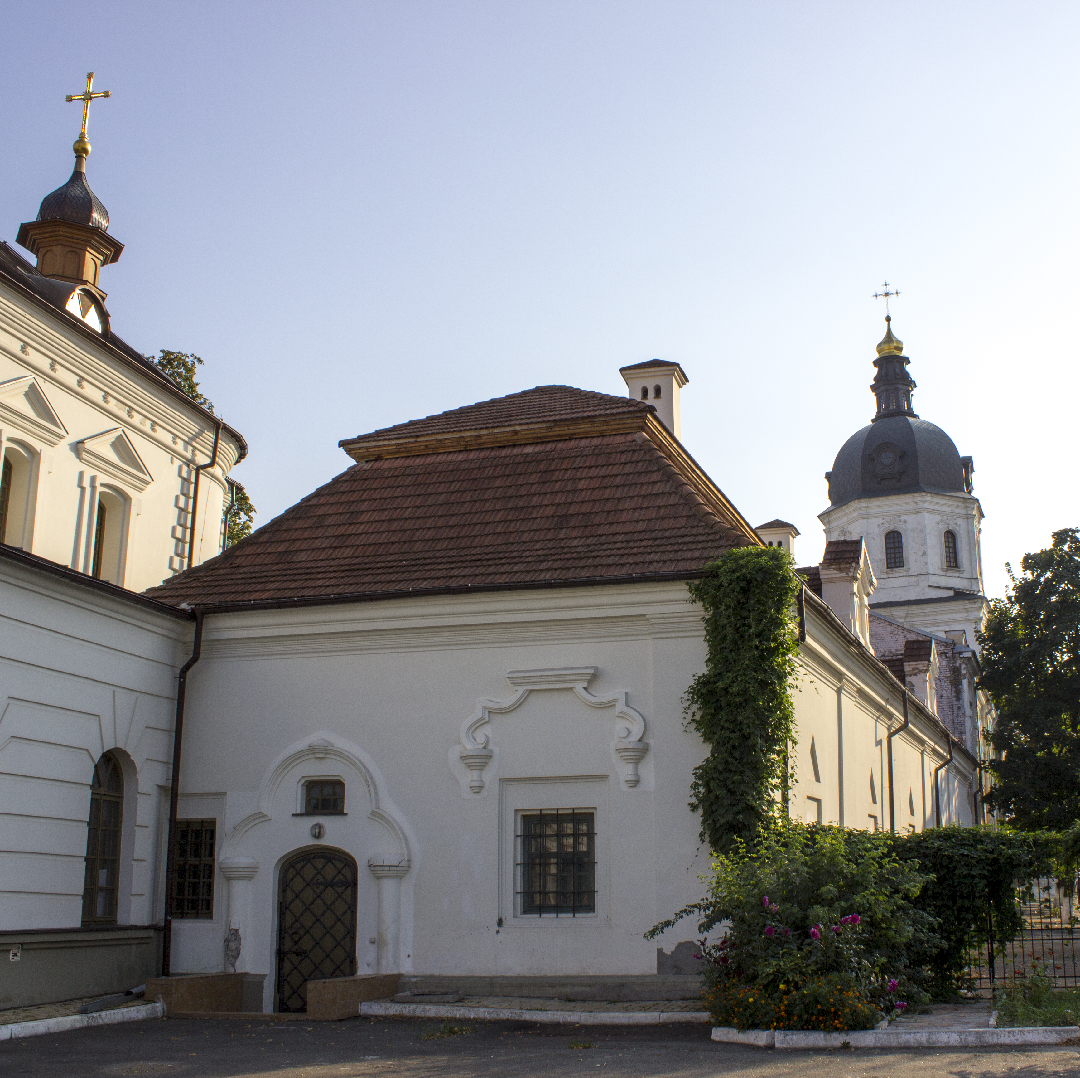 Поварня з келіями, Київ, Сковороди Григорія вул., 2-а